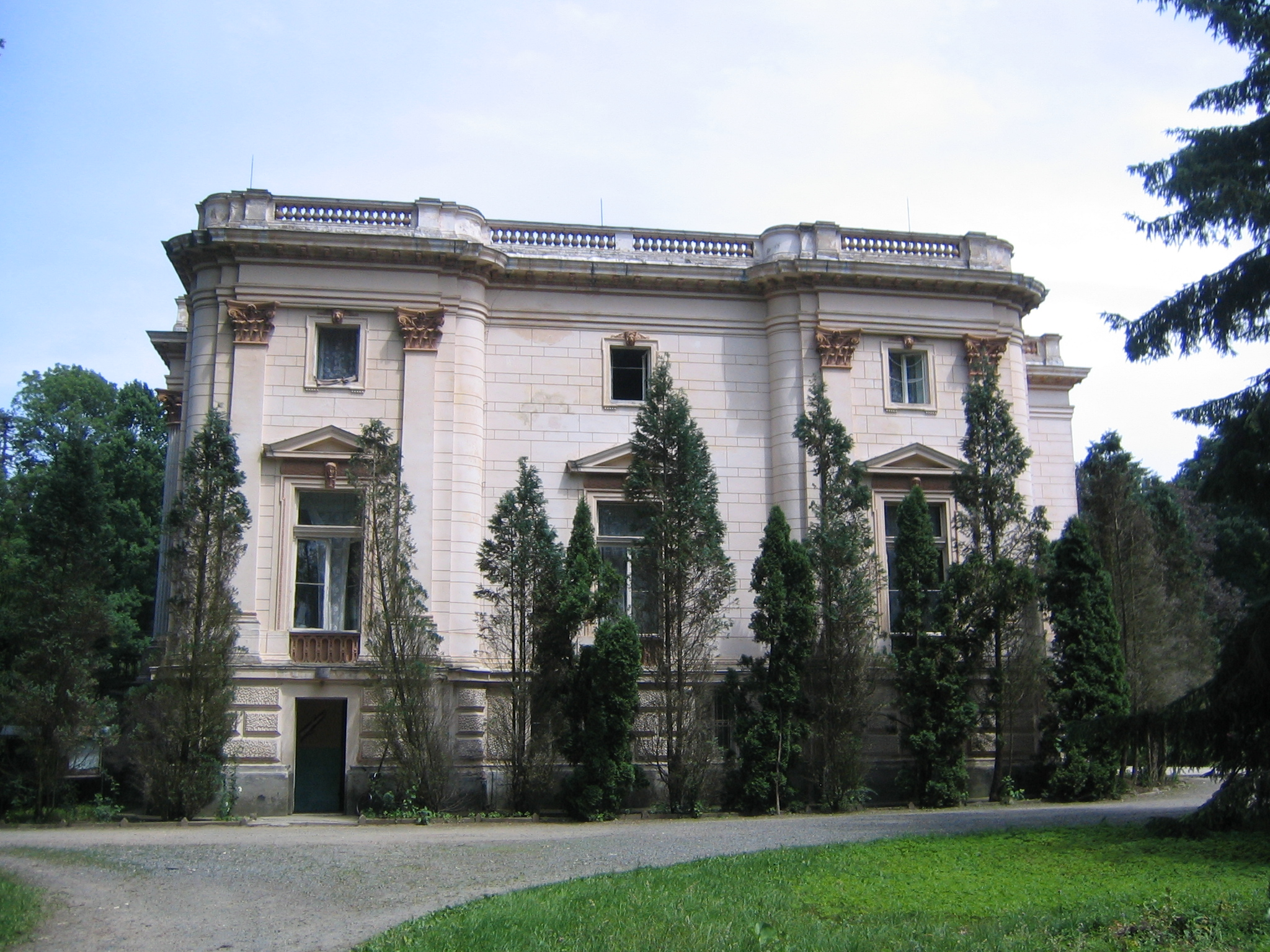 Castelul de la Capalnas, Arad 01